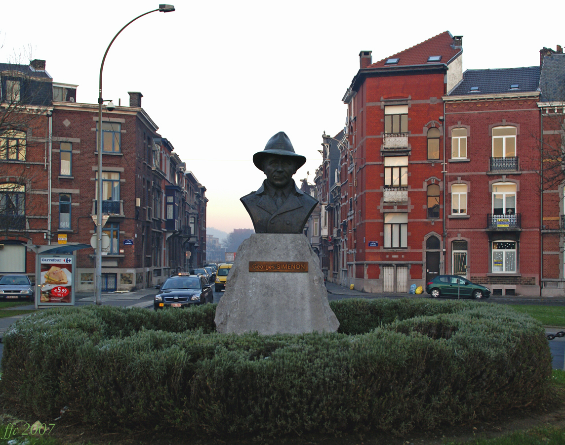 Buste Simenon à la place du Congrès à Liège, au bout de la rue Simenon